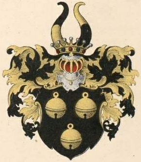 Klopmanni suguvõsa parunivapp